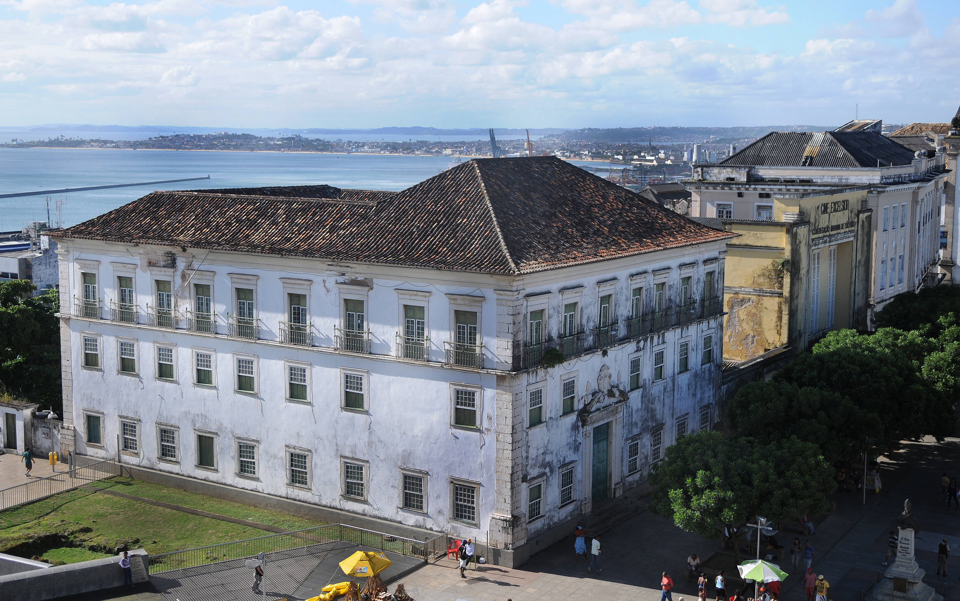 Palácio Arquiepiscopal da Sé